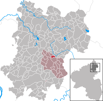 Mähren in Rhineland-Palatinate - Westerwaldkreis